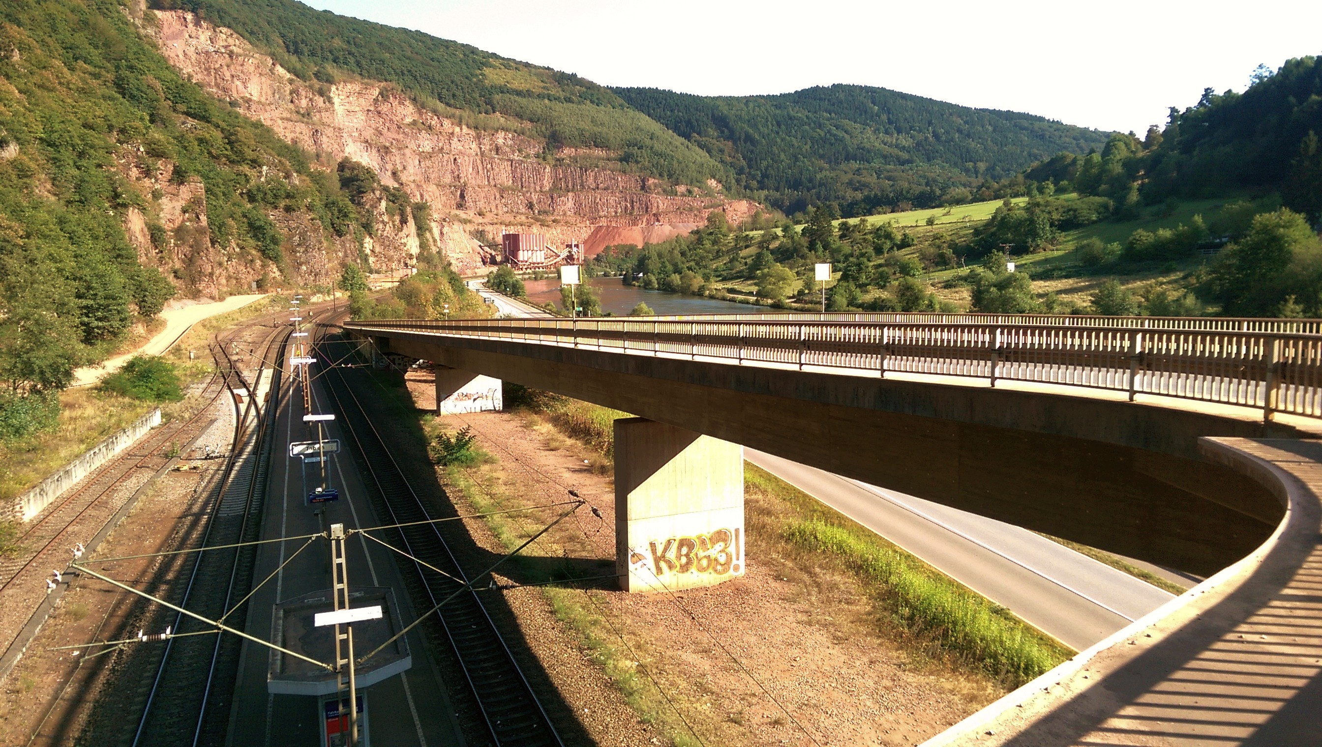 Bahnhof Taben an der Saarstrecke. Der Bahnsteig (links unten im Bild) ist nur über eine lange Treppe von der Brücke über die Bahnstrecke (= Kameraposition) erreichbar. Zwischen Bahn und Saar verläuft die Bundesstraße 51. Im Bildhintergrund befindet sich der Steinbruch der Hartsteinwerke Johann Düro GmbH & Co. KG.